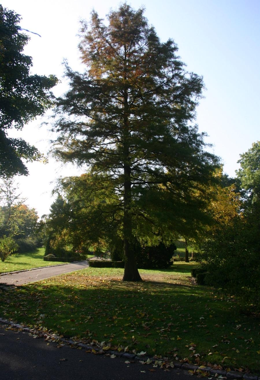 Taxodium distichum: Habit. Photo: Sten Porse